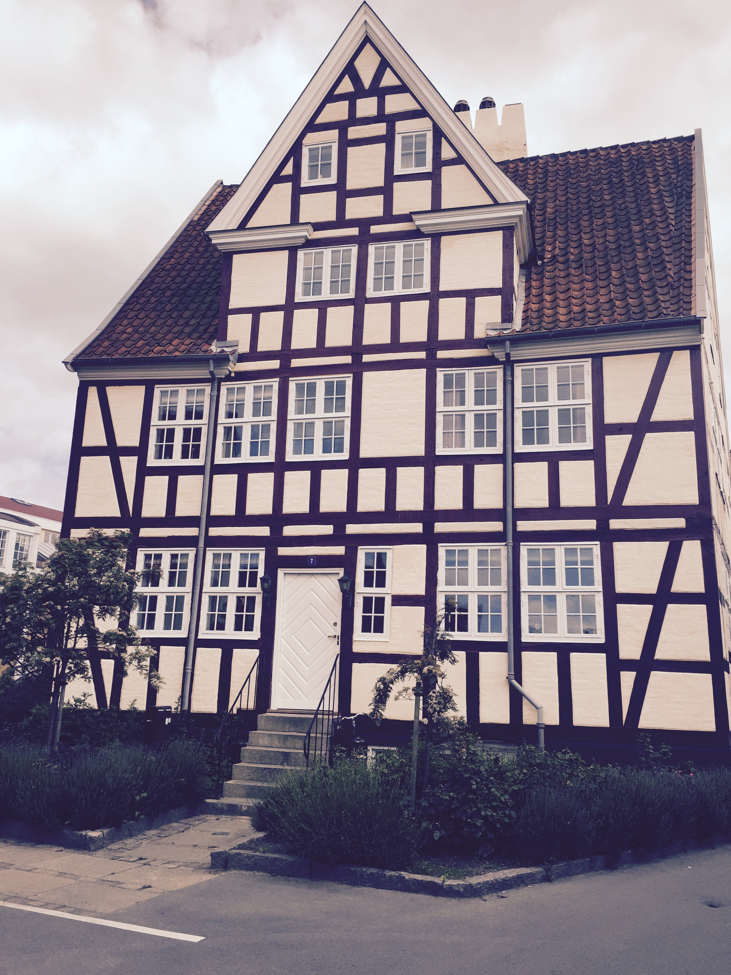 Half-timbered house at Wilders Plads in Copenhagen, Denmark